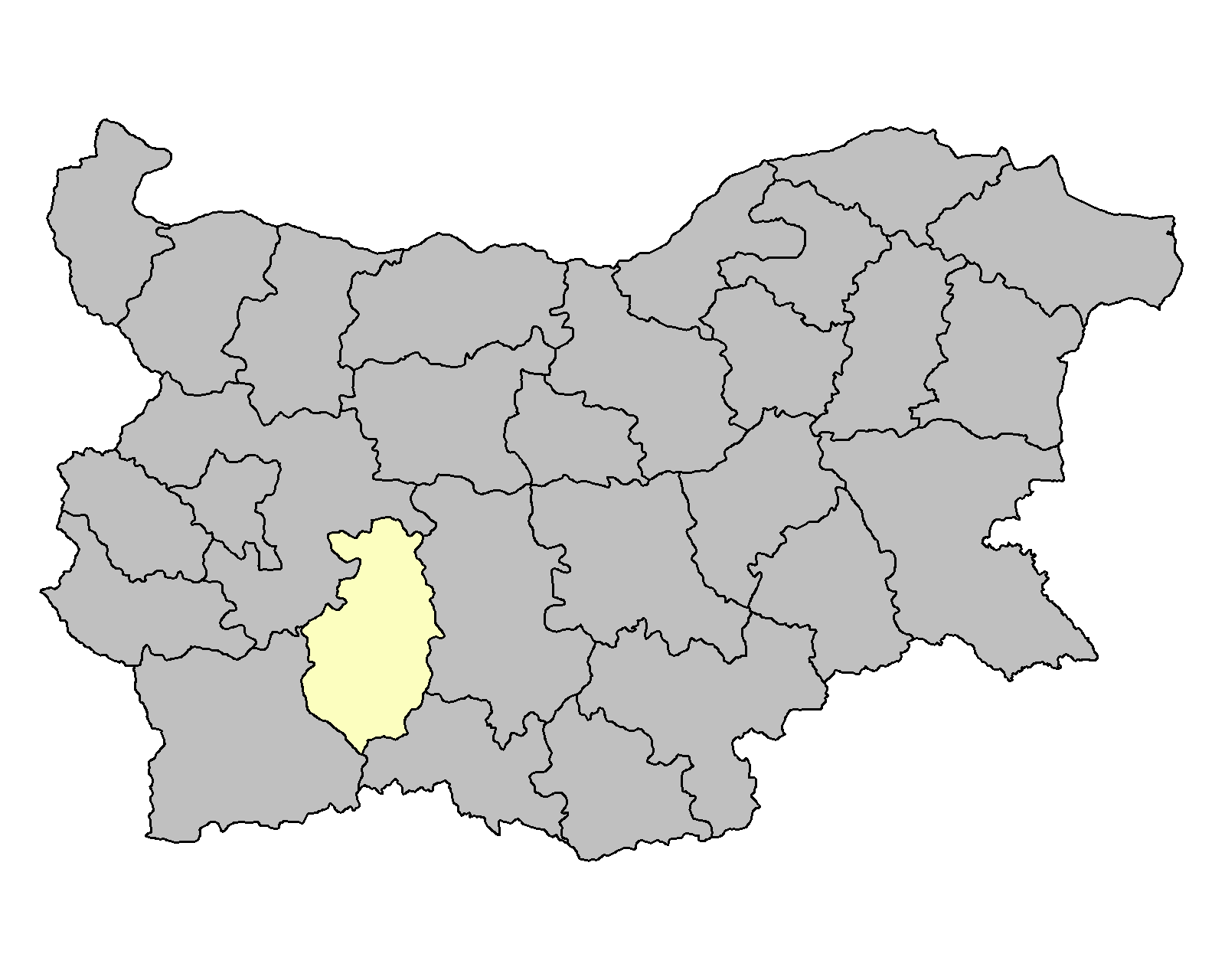 Област Пазарджик на картата на България